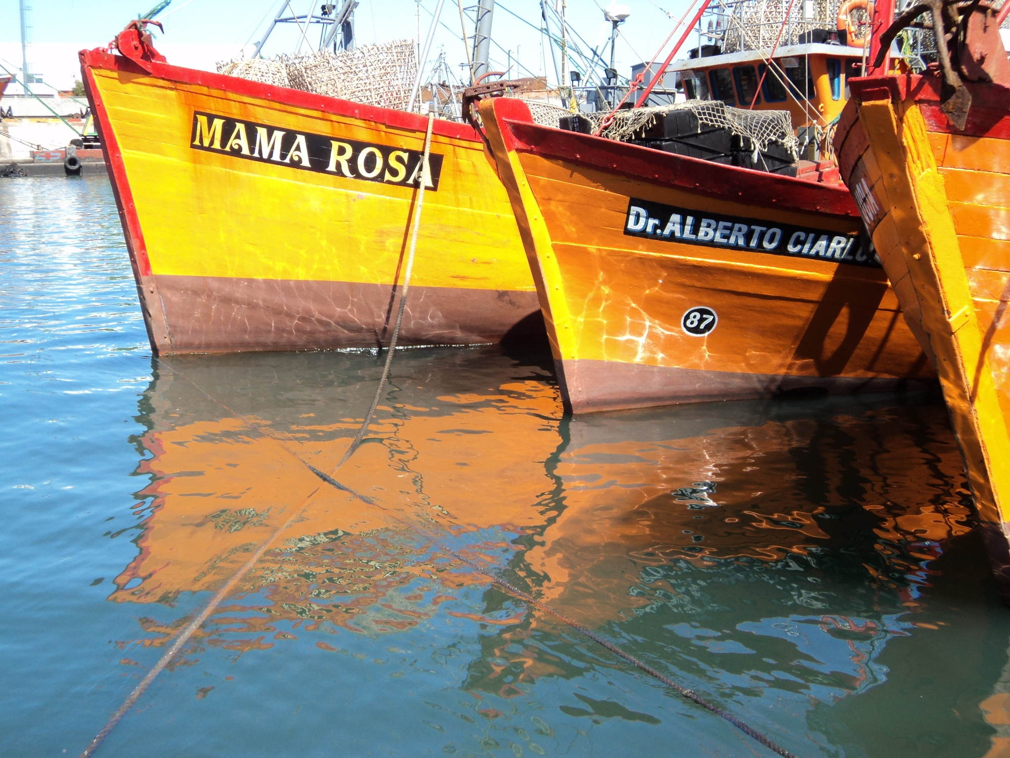 Puerto y barcos de pesca. Mar del Plata. Buenos Aires. Argentina.